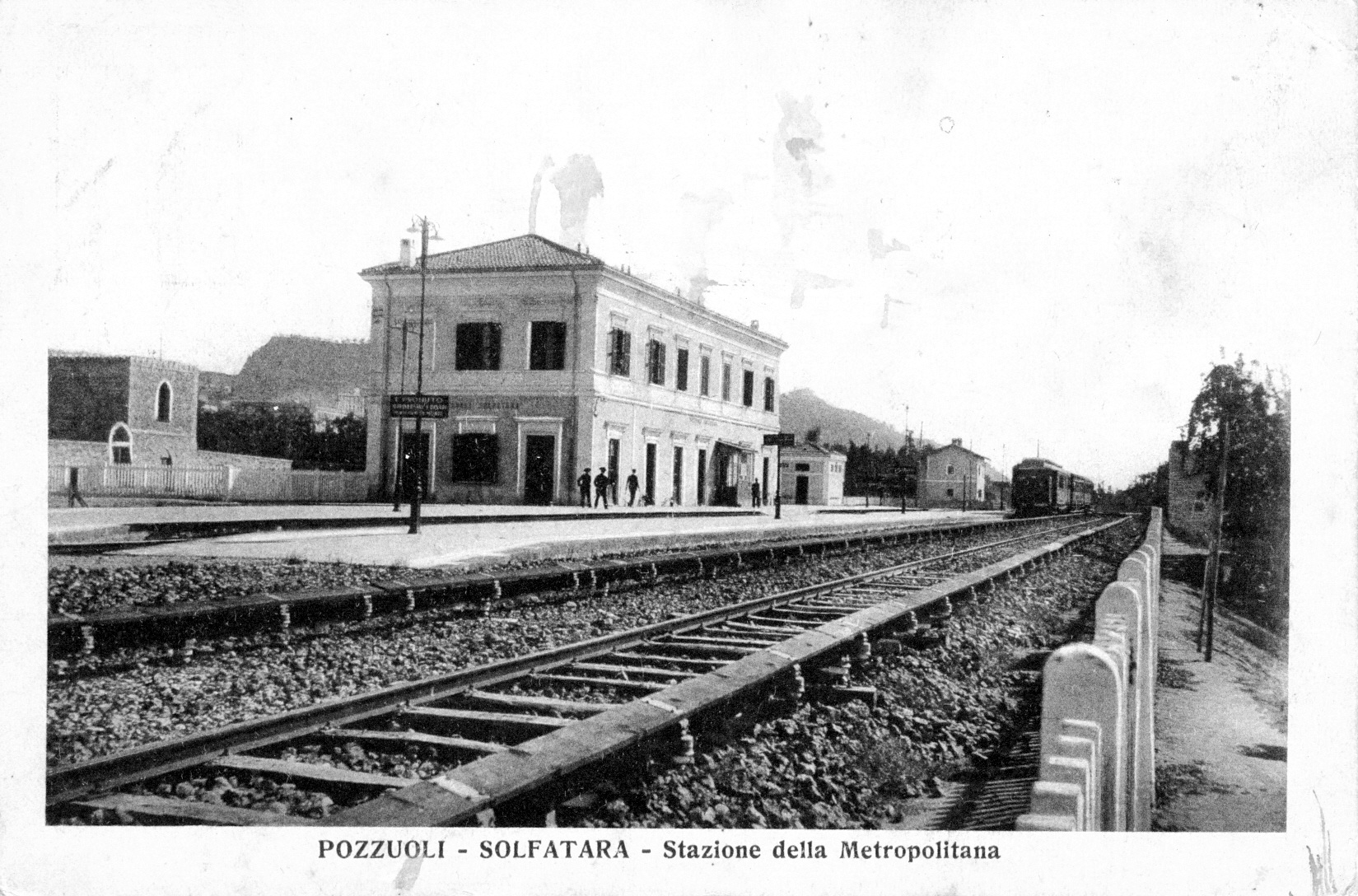 Stazione ferroviaria di Pozzuoli Solfatara ai tempi dell'esercizio a terza rotaia